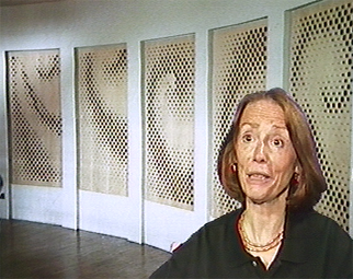 Portrait de Béatrice Casadesus